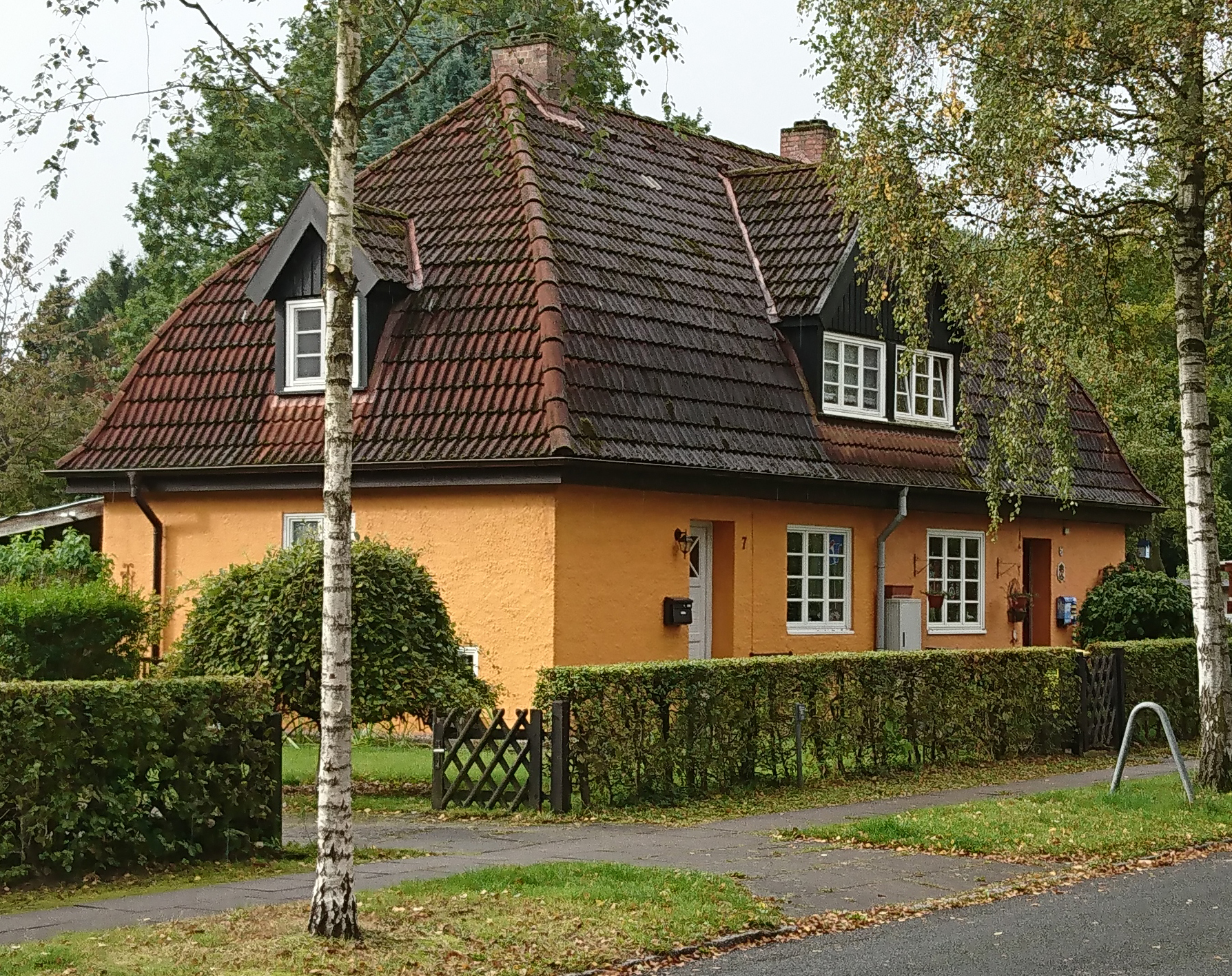 Timmerloh 5, 7. Timmerloh 7 wohnte der Maler Herbert Spangenberg mit seinen Eltern, bis er auszog. This is a photograph of an architectural monument.